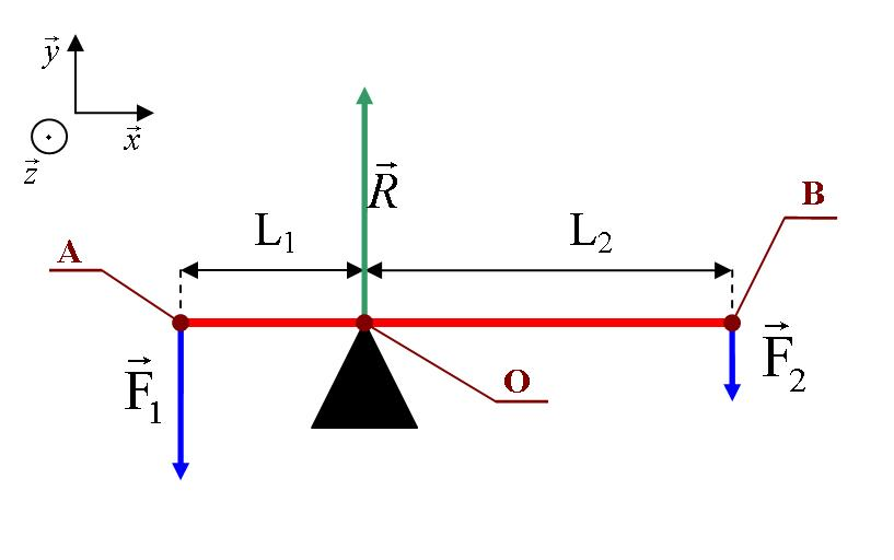 Schéma d'un levier pour étude statique Auteur : Xavier Lory